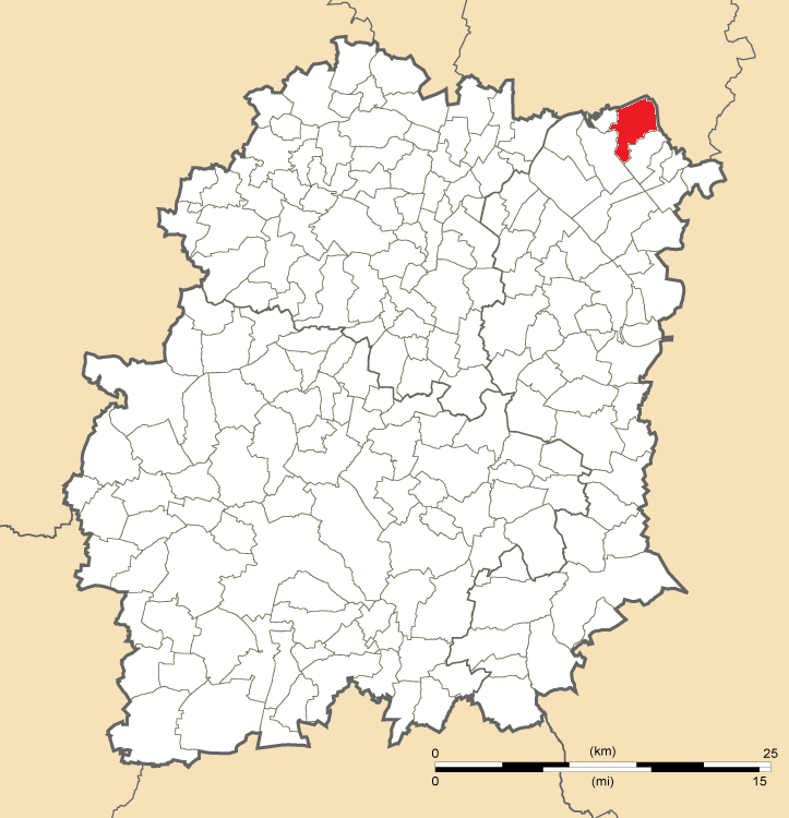 Carte de position d'Yerres en Essonne